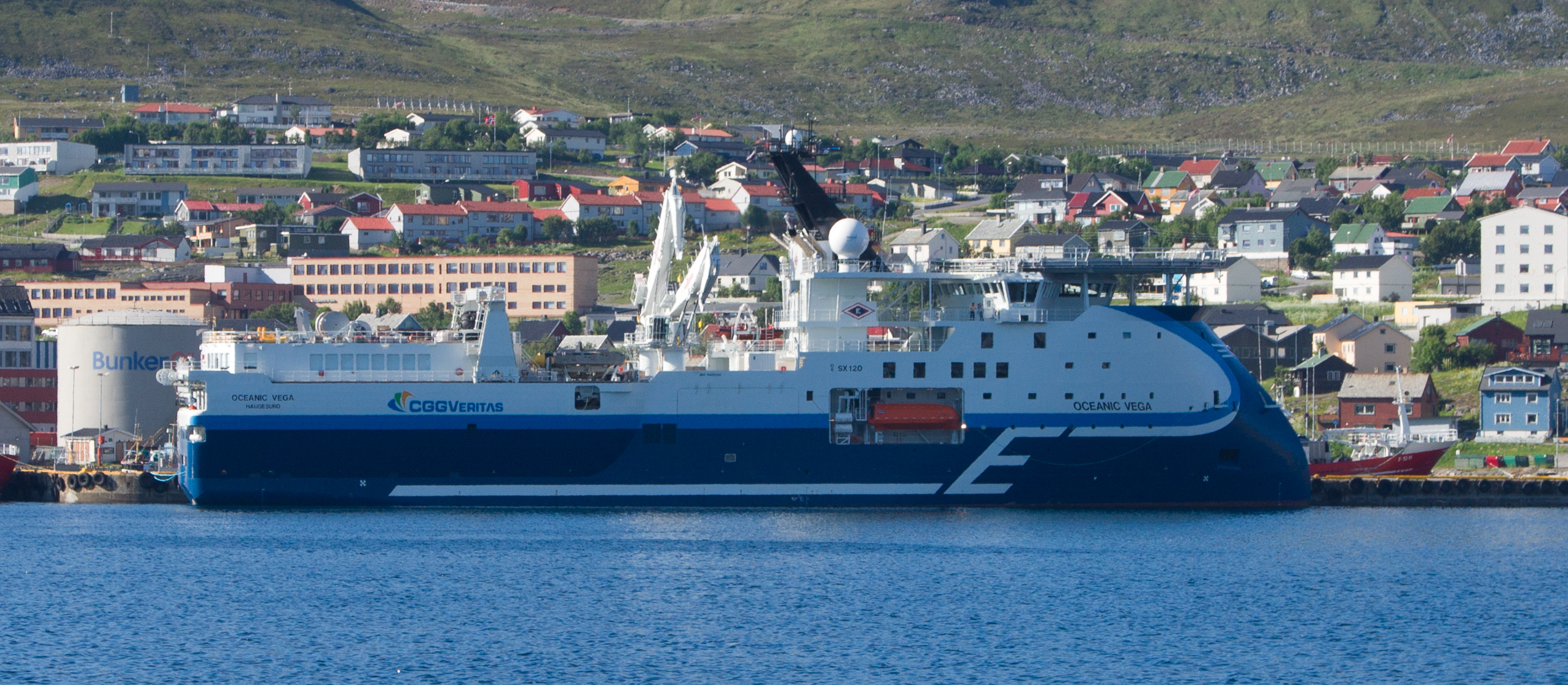 L'Oceanic Vega, un navire de prospection pétrolière. navire à étrave inversée. Ici dans le port d'Hammerfest.